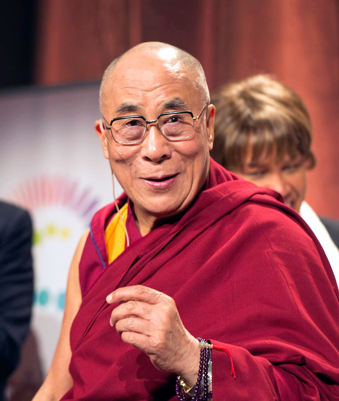 Tibetský dalajláma v roce 2012